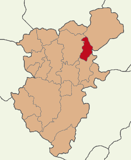 Baklan ilçesinin konumu